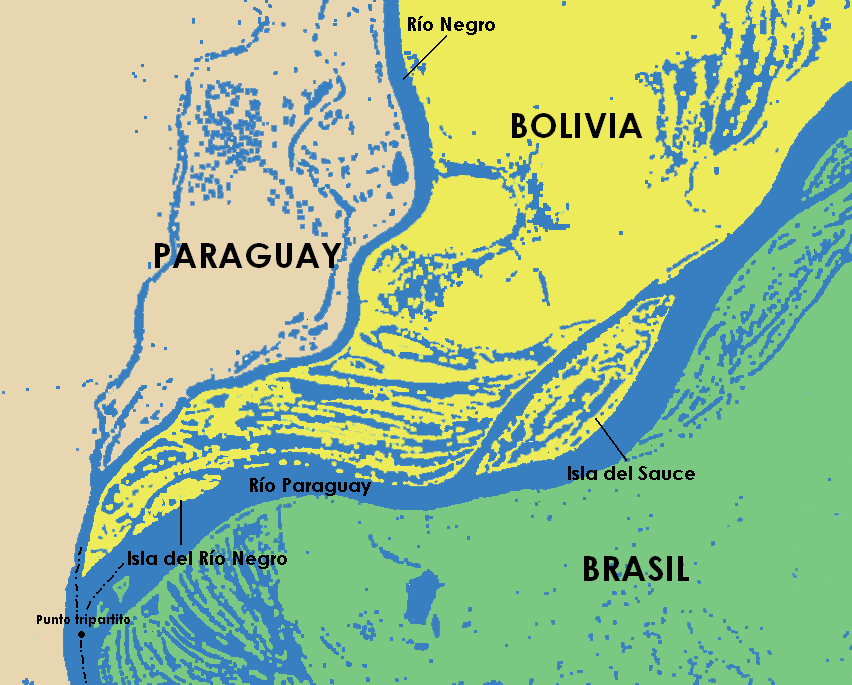 Mapa del río Paraguay en la zona tripartita de Bolivia, Brasil y Paraguay donde se puede observar las Islas de Sauce y Río Negro, además de los ríos Paraguay y Negro.